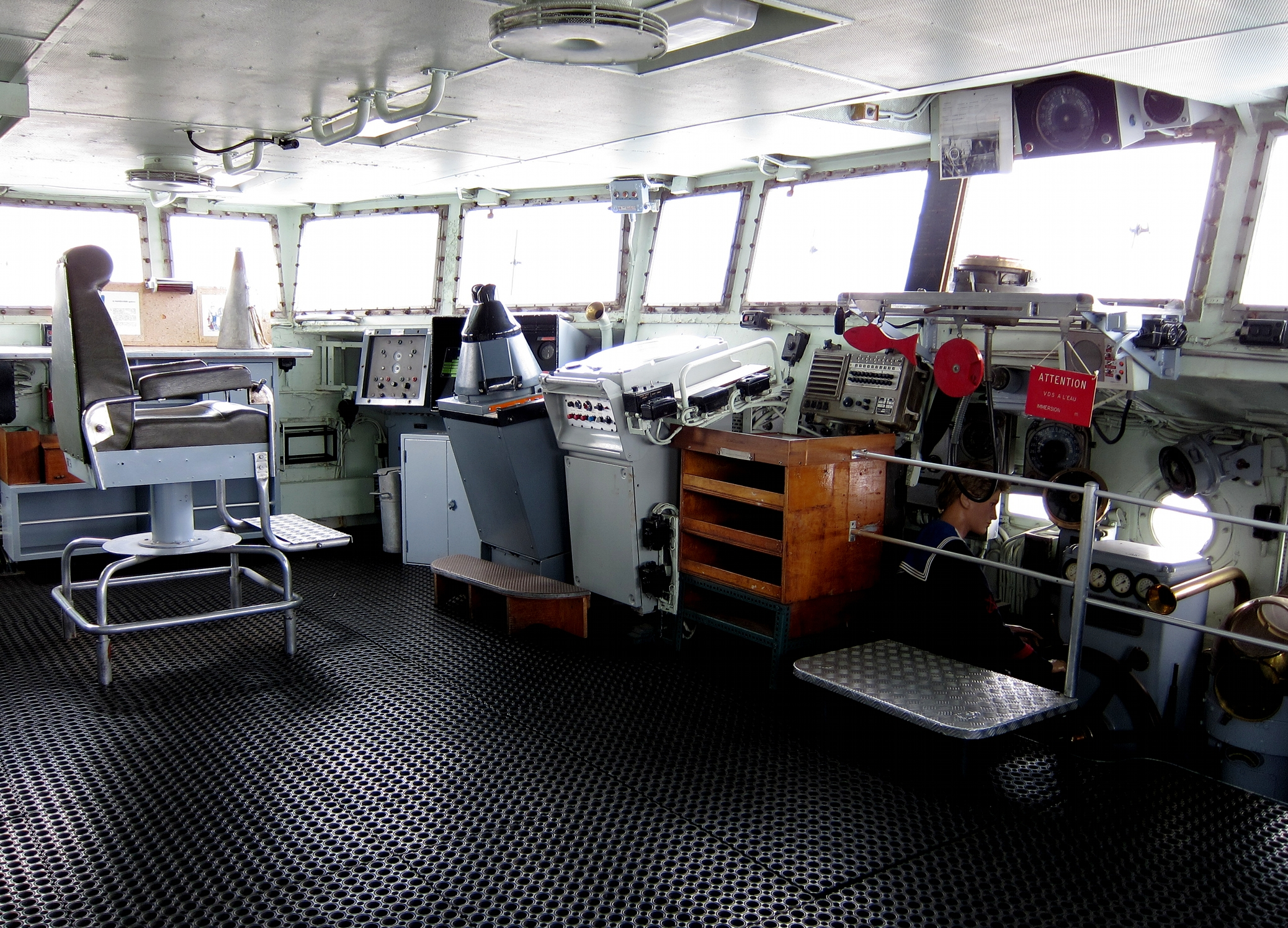 Poste de commandement du Maillé-Brézé à Nantes.